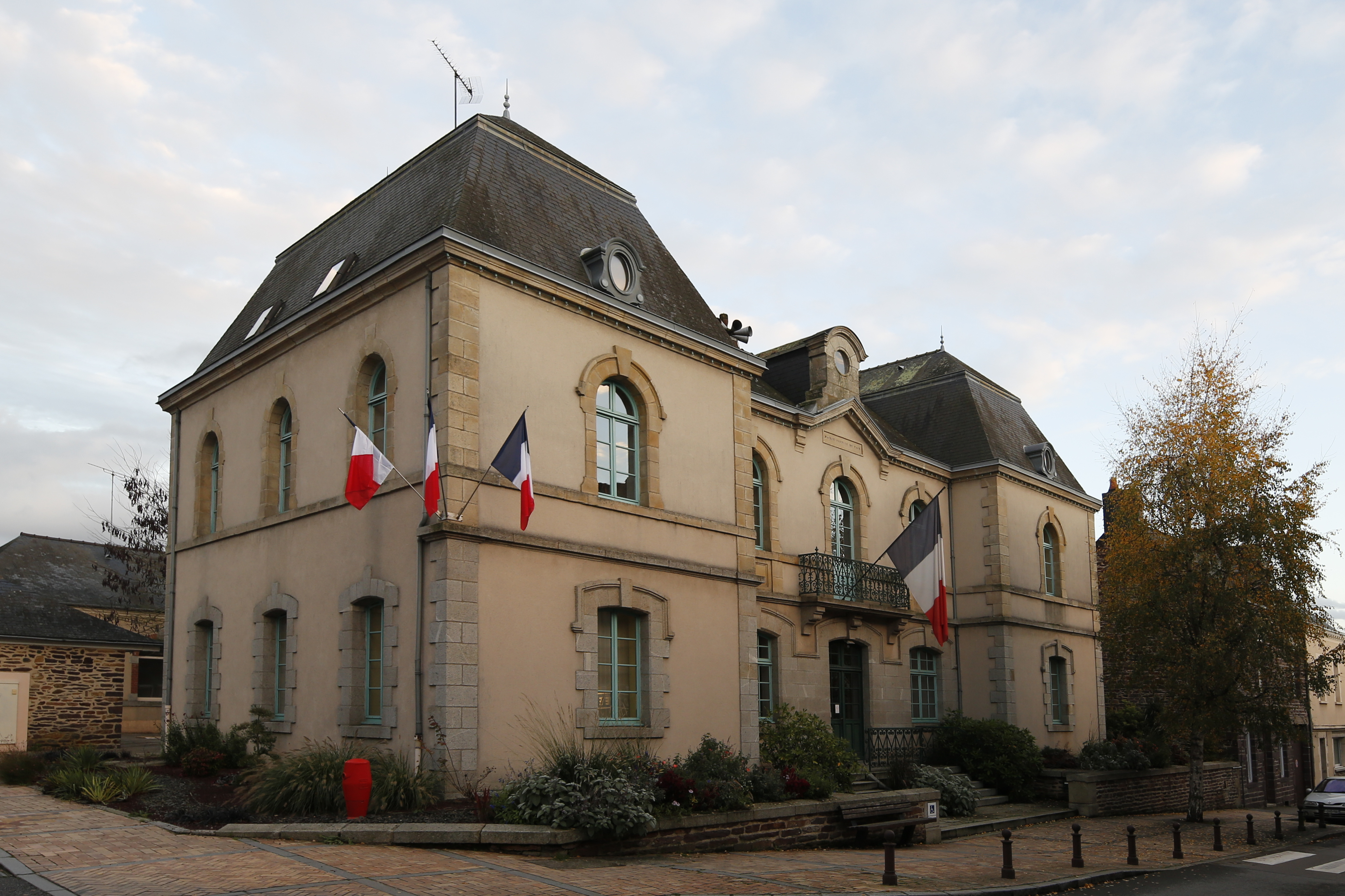 Mairie de Retiers.